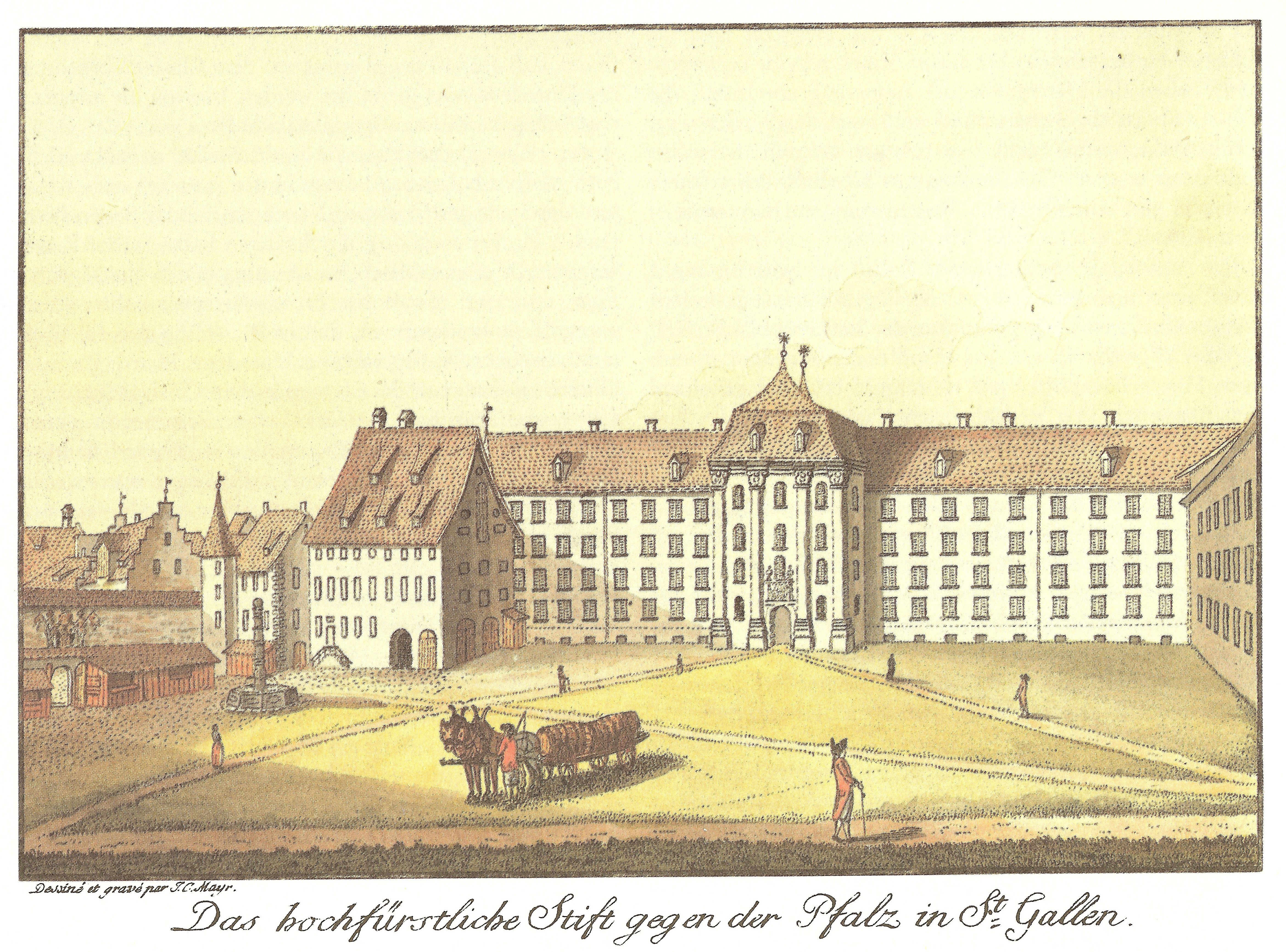 Das hochfürstliche Stift gegen der Pfalz in St. Gallen (Originaltitel).